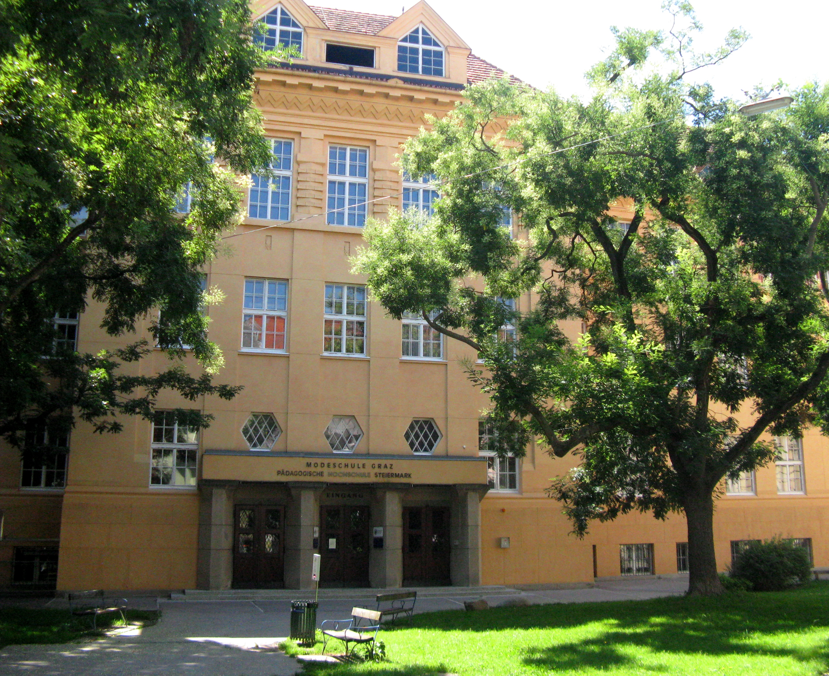 Modeschule Graz, Architekt Adolf von Inffeld